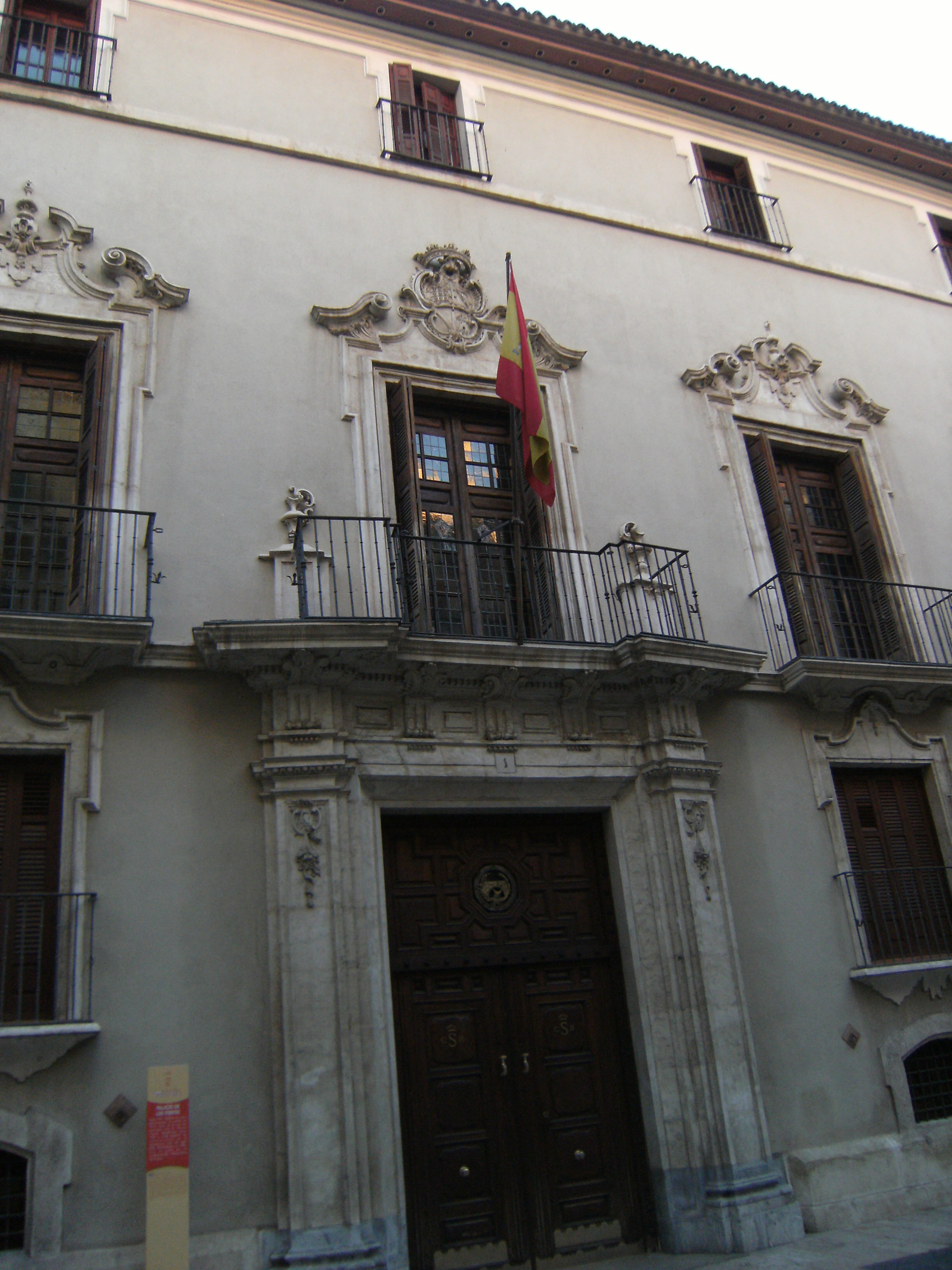 Palacio Fontes de Murcia. Edificio del siglo XVIII.